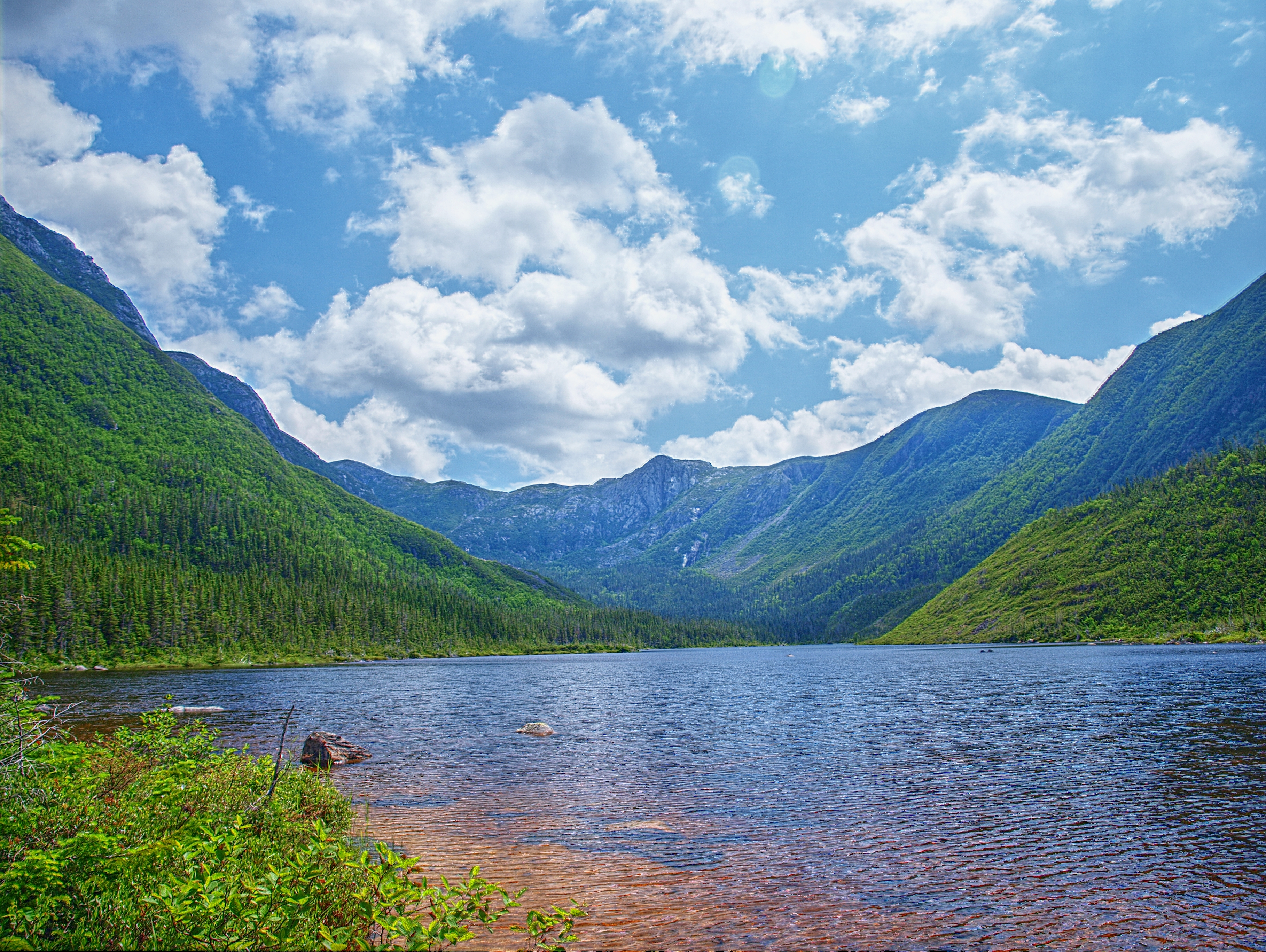 Lac aux Américains